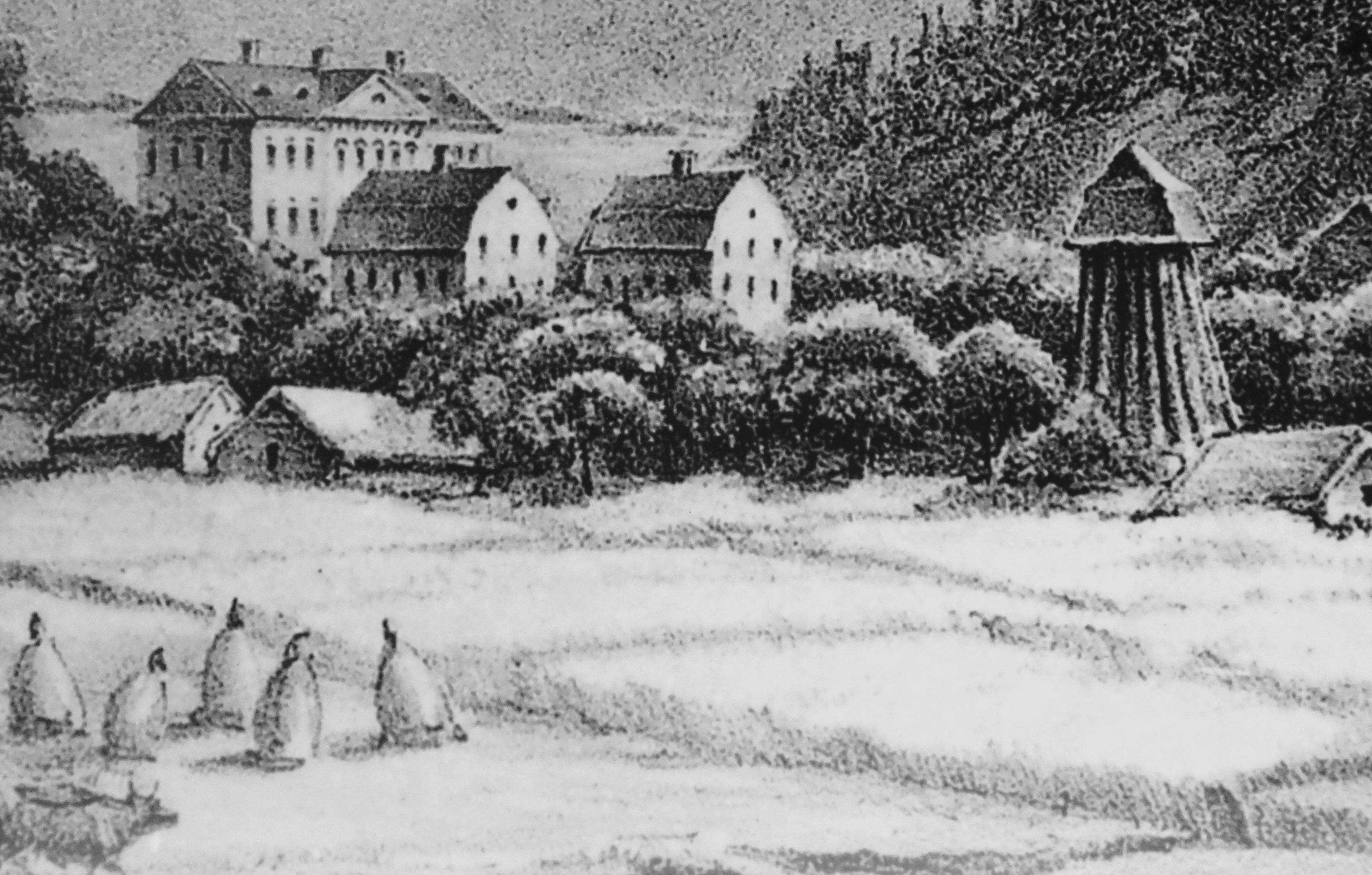 Kopparstick (utsnitt) visande Taxinge-Näsby huvudbebyggelse och flyglarna med ursprungligt utseende